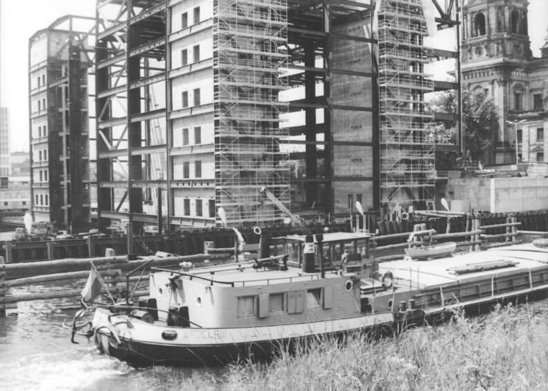 ADN-ZB Sturm 4.7.74 Bauplatz Palast der Republik in Berlin: In seinen Konturen zeigt sich bereits der künftige repräsentative Bau, der ein Haus des Volkes sein wird. Moderne Bautechnologien werden angewandt, um den Palast im ersten Quartal 1976 zu übergeben. UBz.: Binnenschiffer aus Volkspolen schauen jedes Mal interessiert auf die Riesenbaustelle hinüber, wenn sie ihr Weg hier auf der Spree vorbeiführt. Immer deutlicher zeichnen sich die Konturen des künftigen Palastes ab.